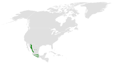 Poecile sclateri distribution map, based on